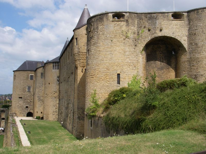 Le château de Sedan.